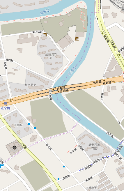 叉袋角地区的地图。叉袋角系上海市市区北部一历史片区名，包含普陀区东南部莫干山路附近及原静安区西北部海防路、淮安路、西苏州路交会处一带。